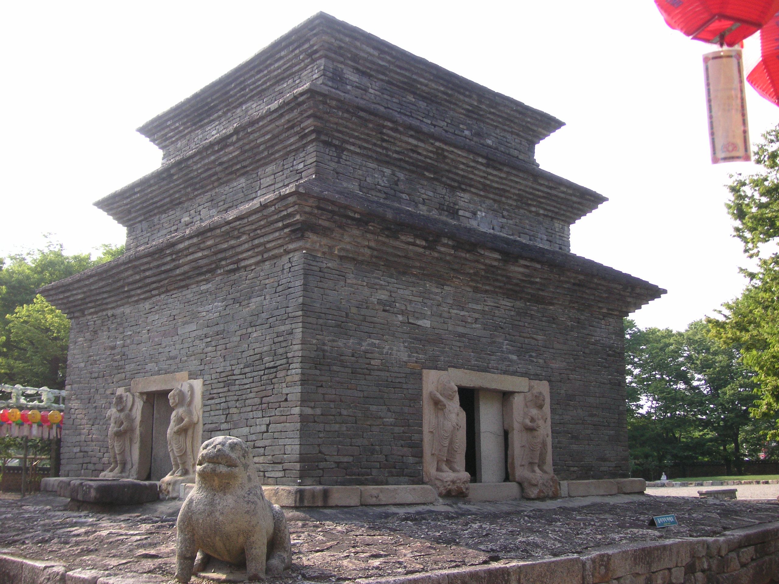 Steinpagode im Tempel Bunhwangsa, Südkorea